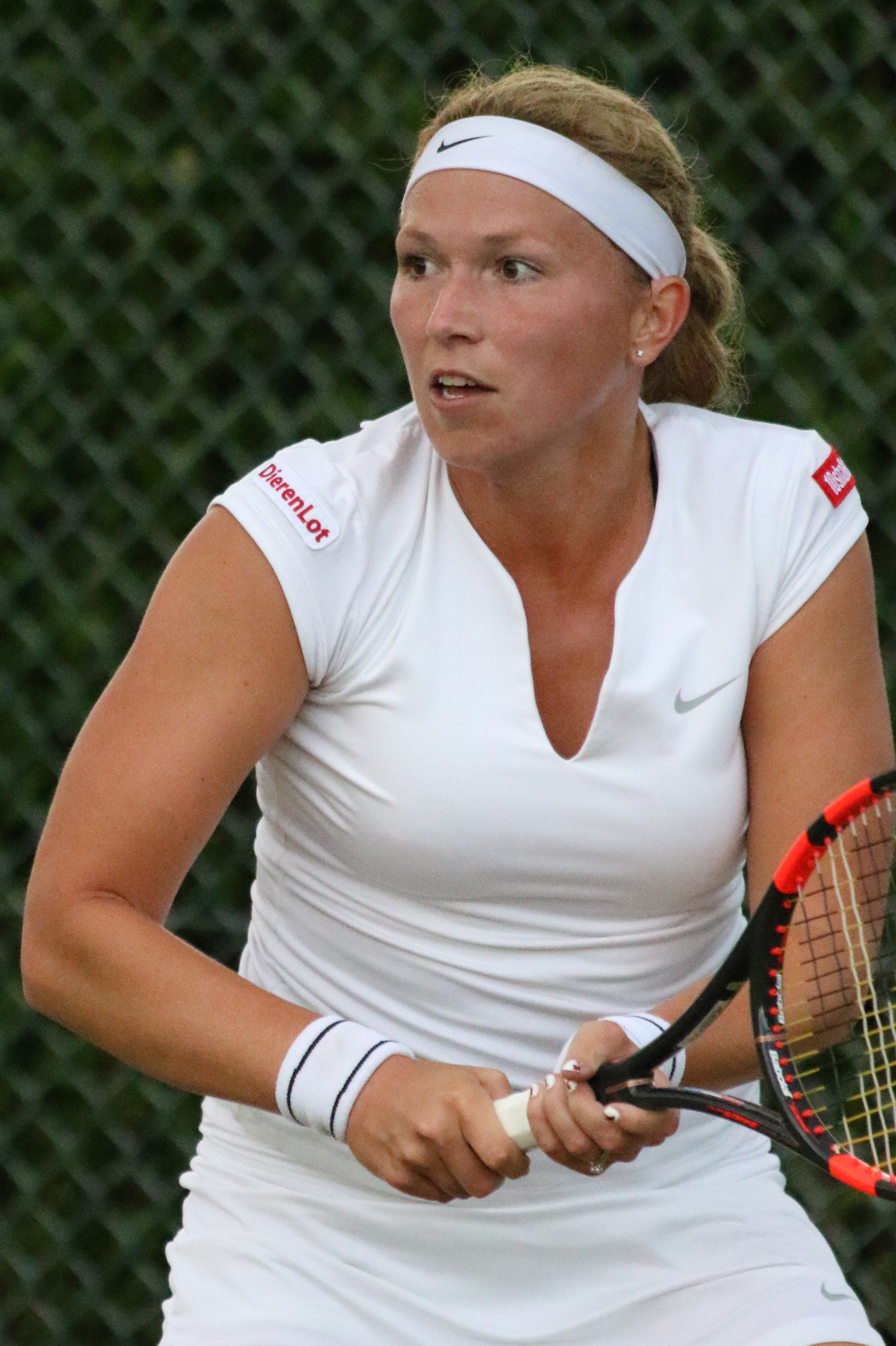 Krajicek M. WMQ16 (11)